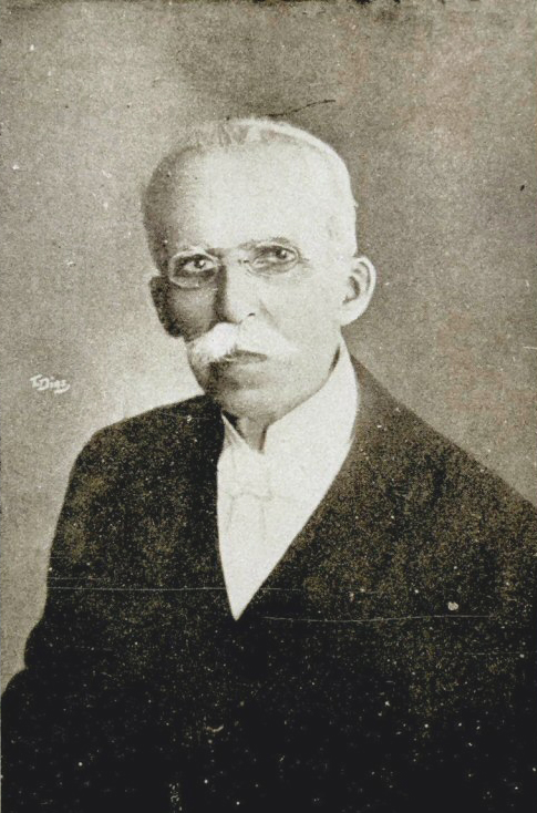 Rui Barbosa, jurista, diplomata, escritor e político brasileiro.